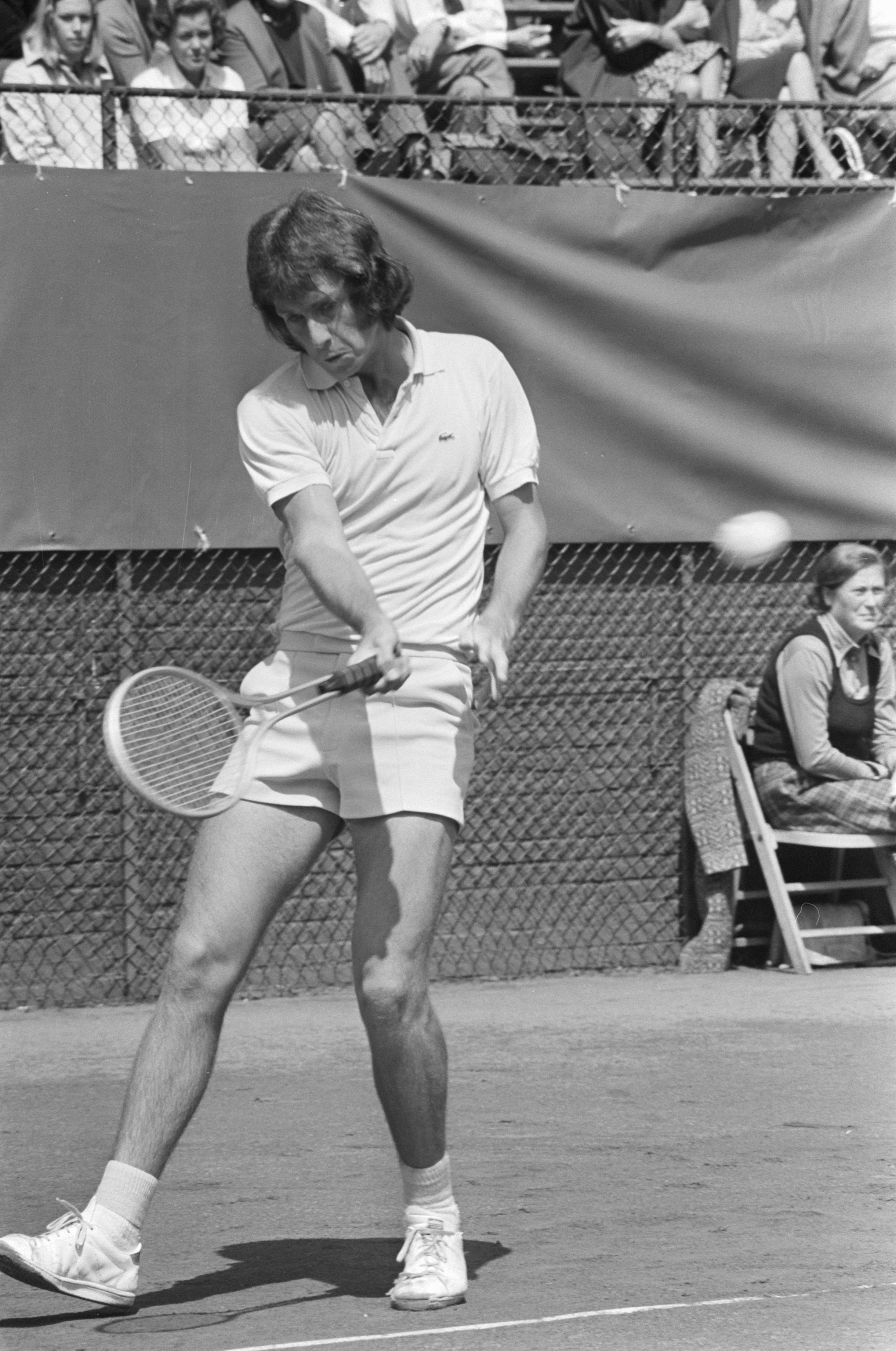 Collectie / Archief : Fotocollectie Anefo Reportage / Serie : [ onbekend ] Beschrijving : Kwartfinales tennistoernooi Melkhuisje, Kronk (Australie) in actie Datum : 18 juli 1974 Locatie : Hilversum Trefwoorden : tennis Persoonsnaam : Kronk, Paul Instellingsnaam : Melkhuisje, 't Fotograaf : Verhoeff, Bert / Anefo, [onbekend] Auteursrechthebbende : Nationaal Archief Materiaalsoort : Negatief (zwart/wit) Nummer archiefinventaris : bekijk toegang 2.24.01.05 Bestanddeelnummer : 927-3360